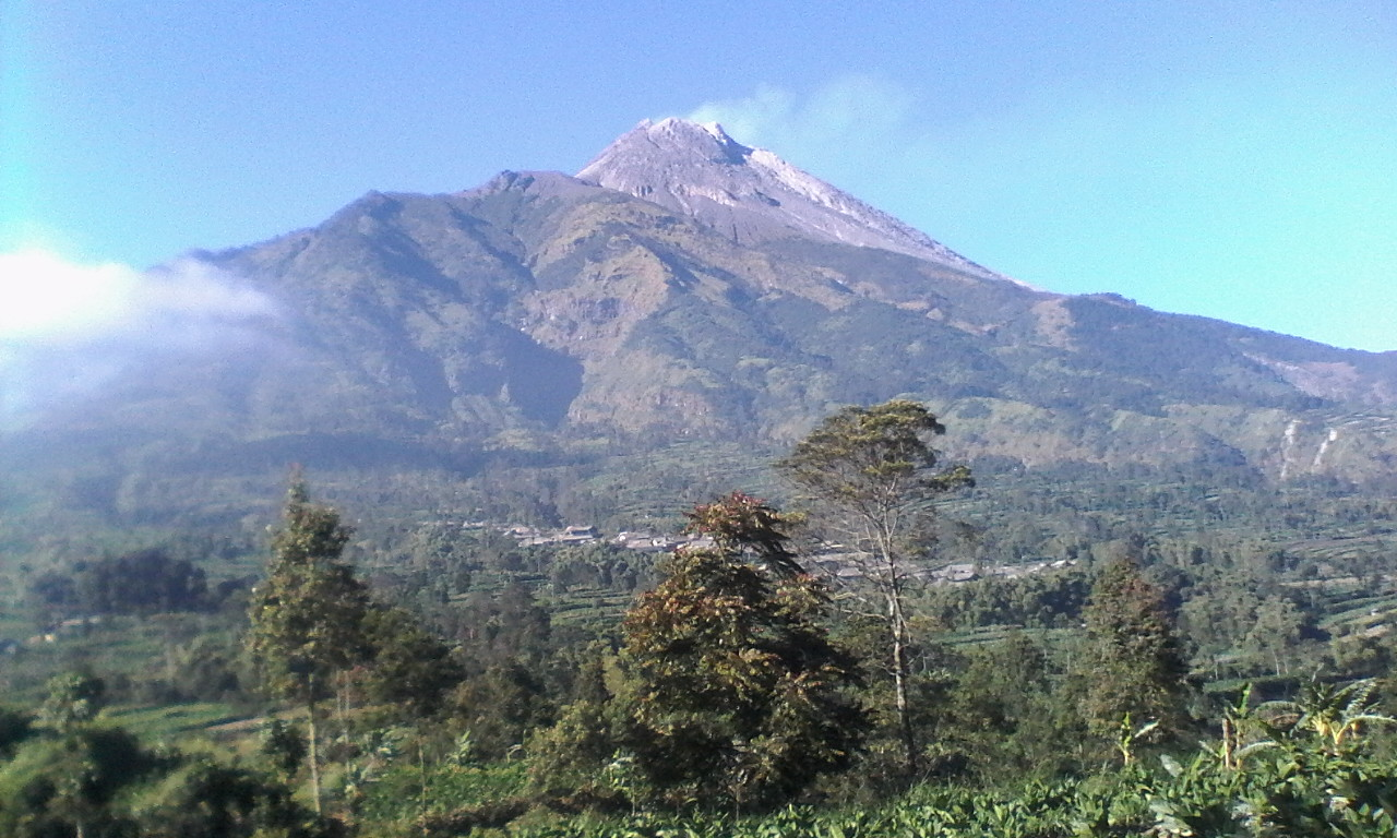 Jawa: Redi Merapi yaiku salah sijiné redi ing tlatah Selo, Cepogo, Boyolali.